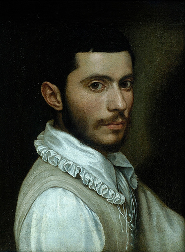 Self-portrait